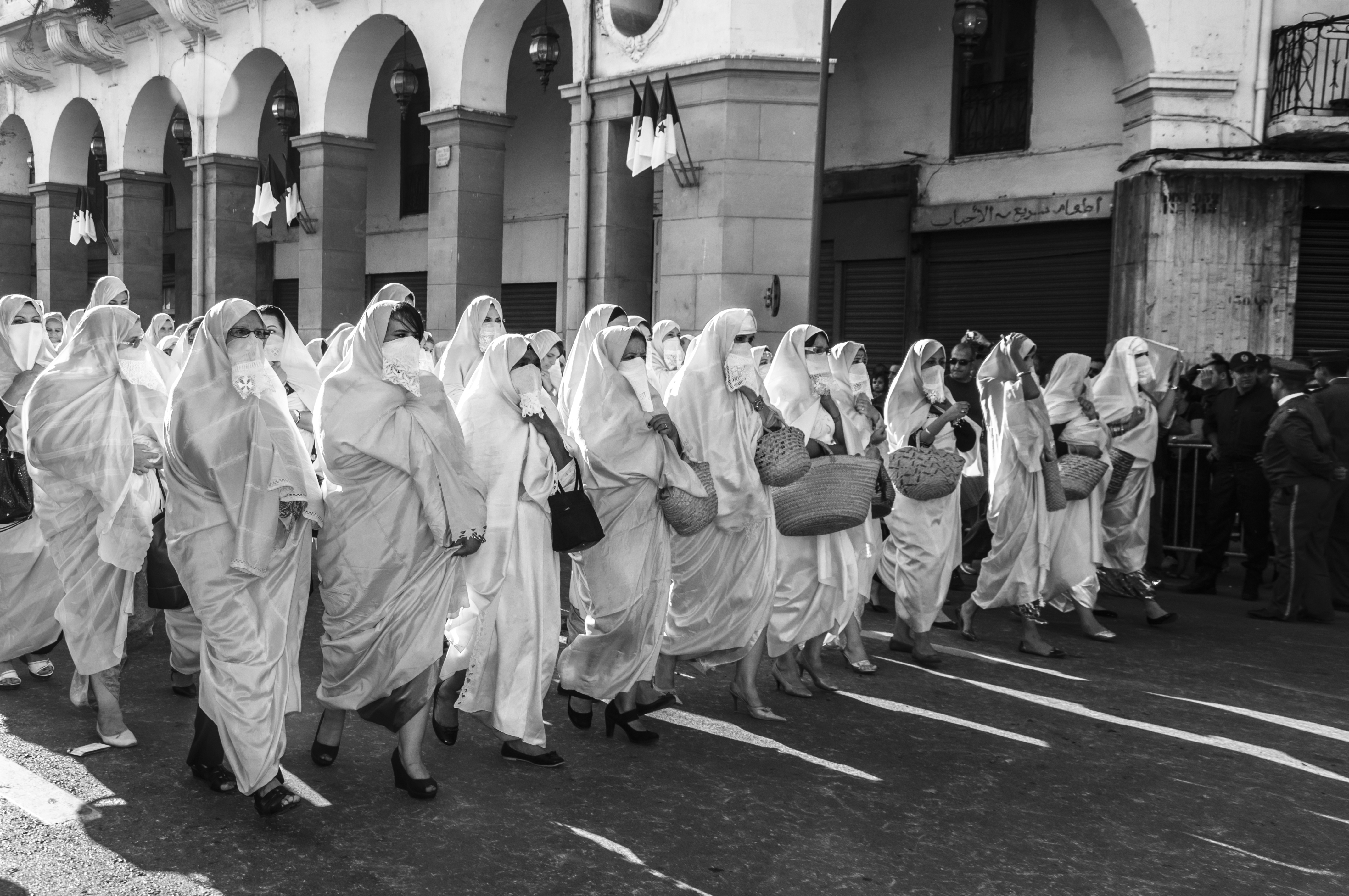 tradition algérienne This is an image with the theme "Play" from: Algeria